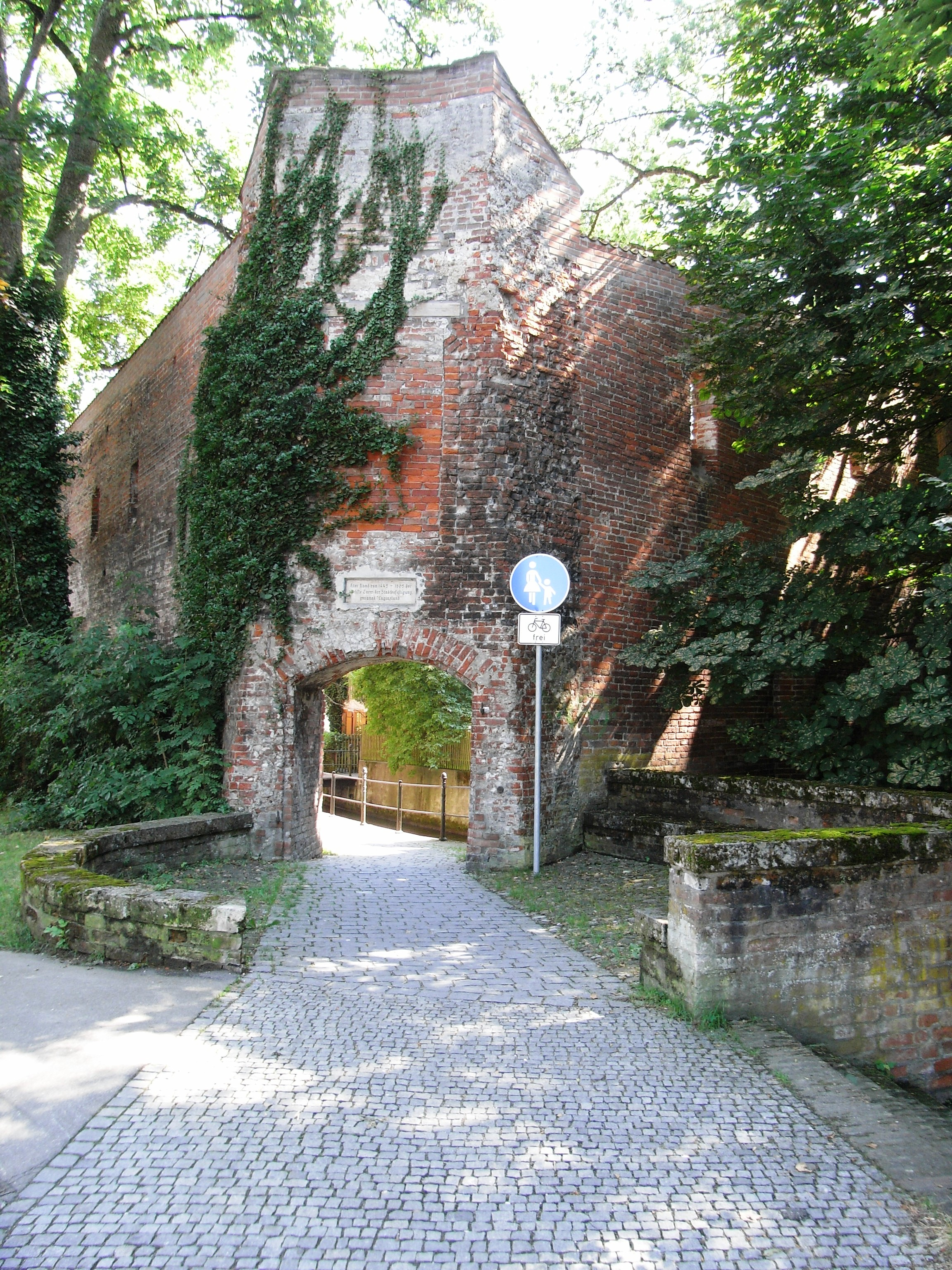 Der Platz an dem der Luginslandturm stand